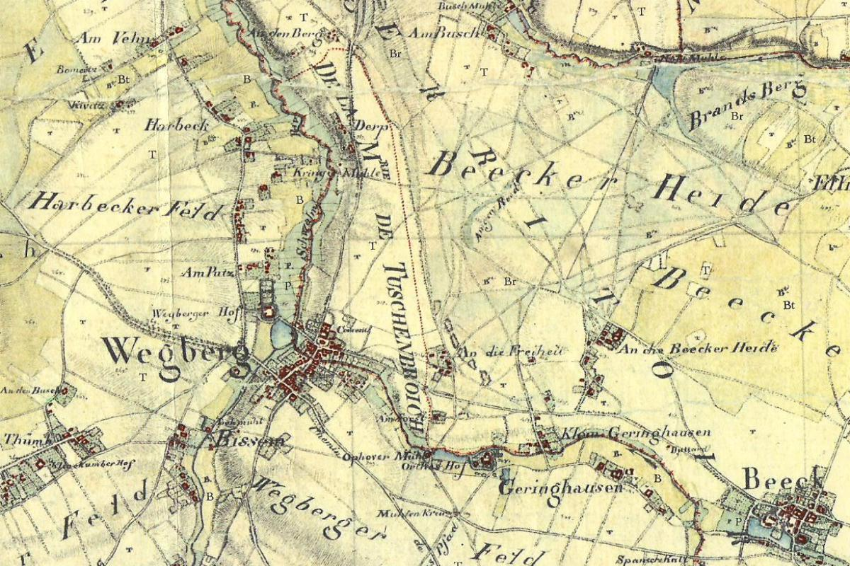 Kartenaufnahme der Rheinlande 48 Wegberg